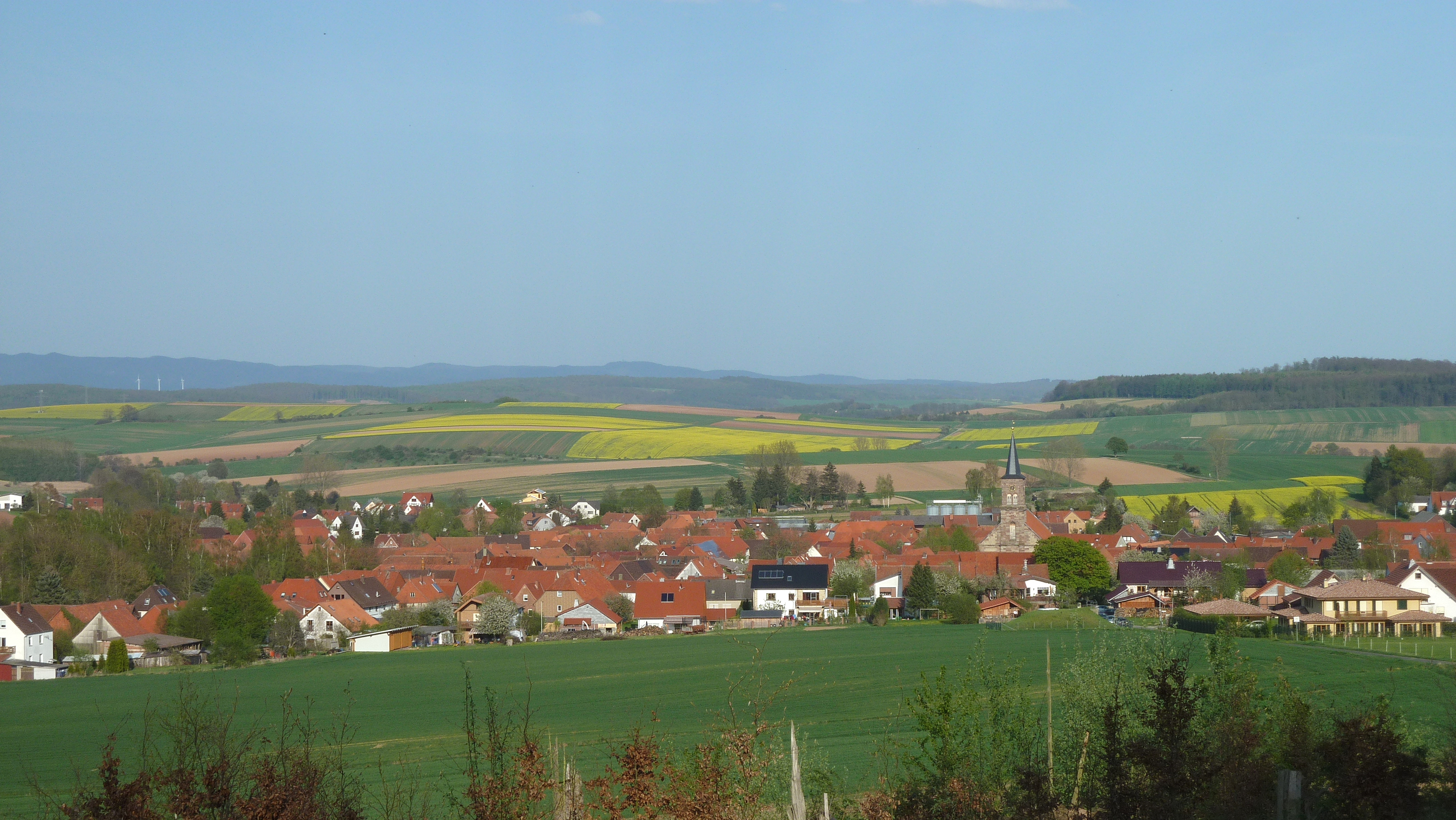 Blick von Westen vom Hang des Wehbergs auf Gillersheim